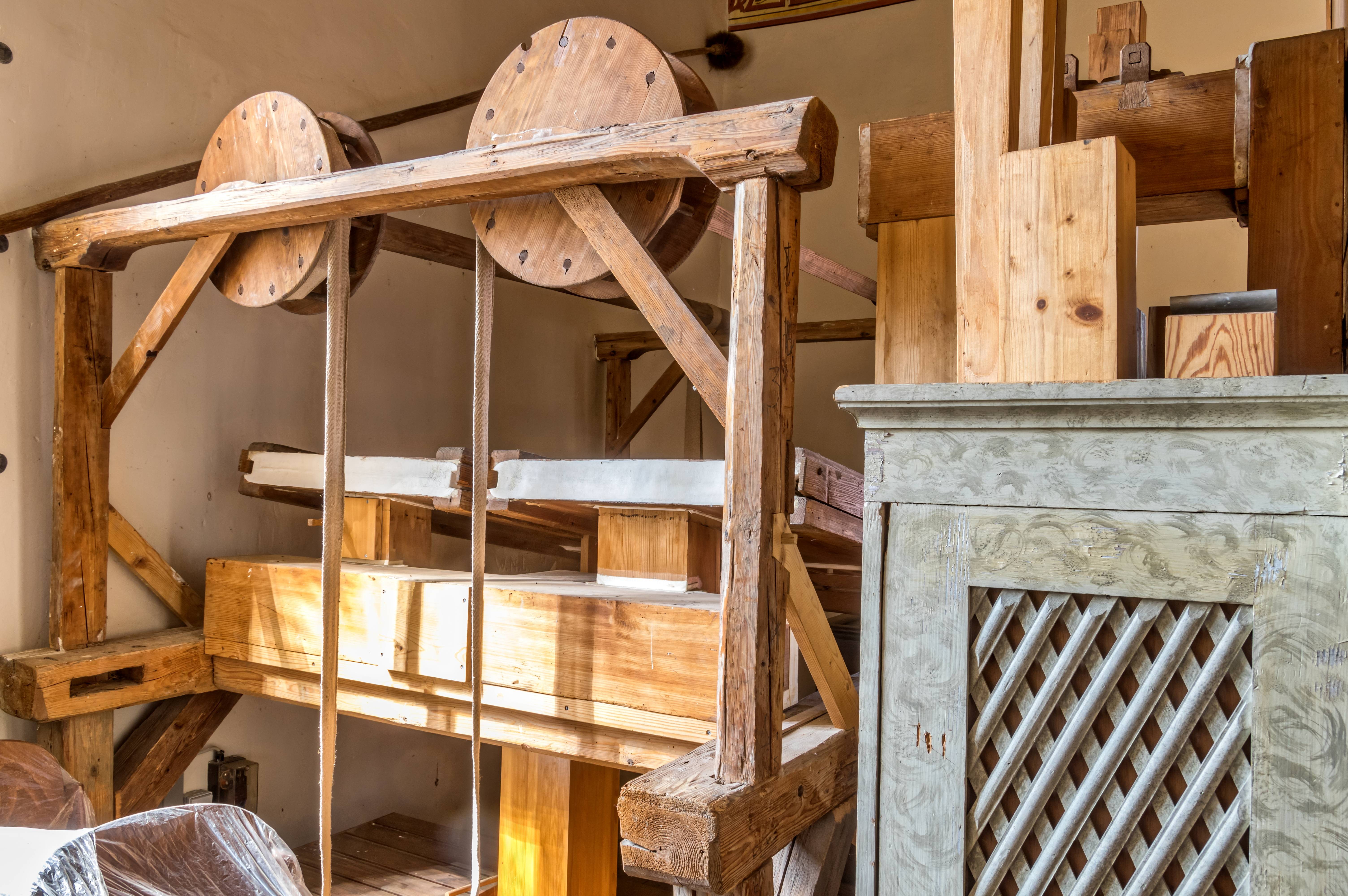 St. Aegidien in St. Ilgen einem Teilort von Laufen Die historische Orgel, mit Detailaufnahmen Der Zugmechanismus der beiden Bälge